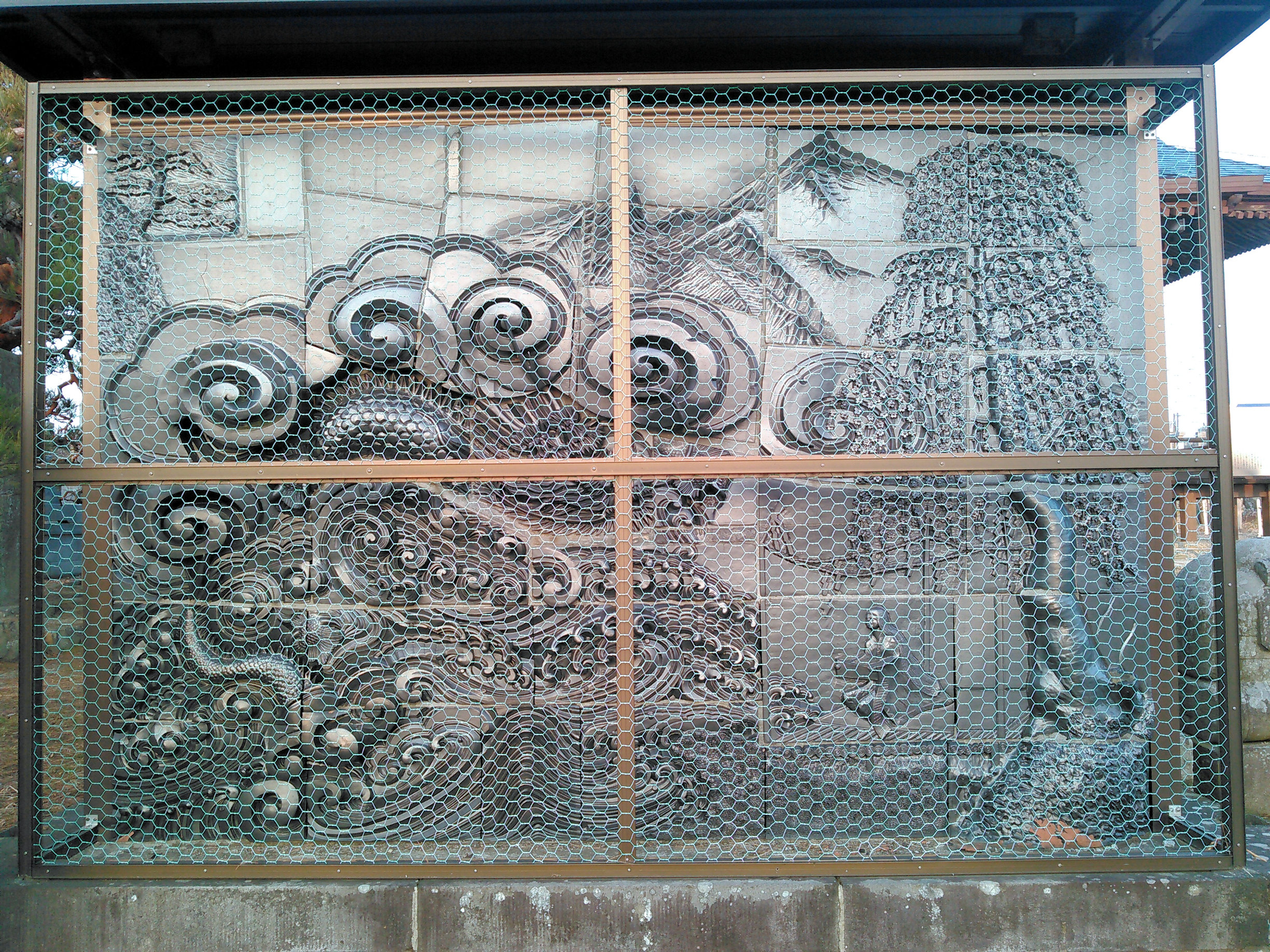 郡山蛇骨地蔵堂佐世姫物語レリーフ